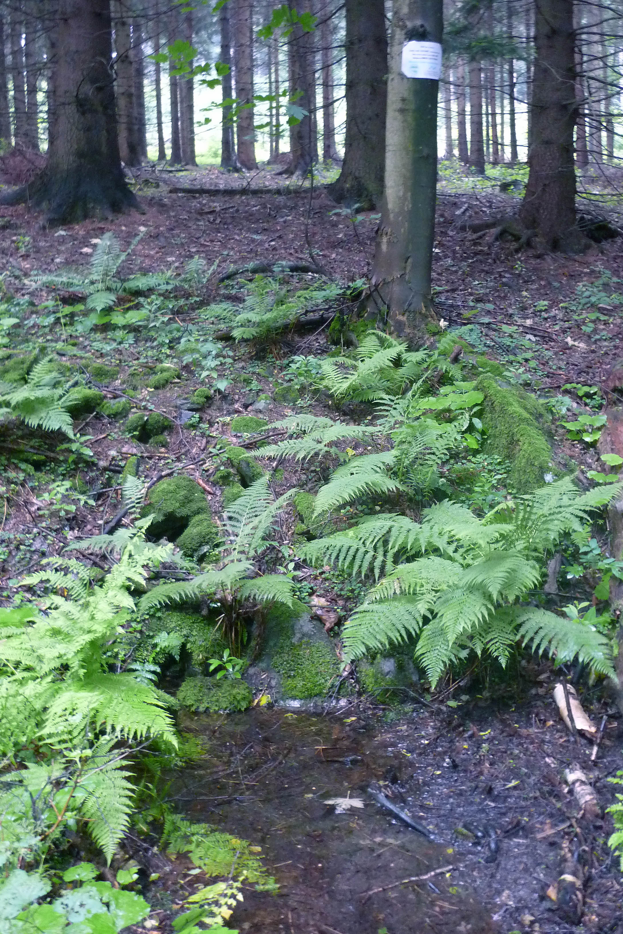 Die Quelle der Katzbach (594 m) am Hang unterhalb des Turzec (Schubertberg) am Bleibergkamm (Góry Ołowiane) im Bober-Katzbach-Gebirge in Niederschlesien